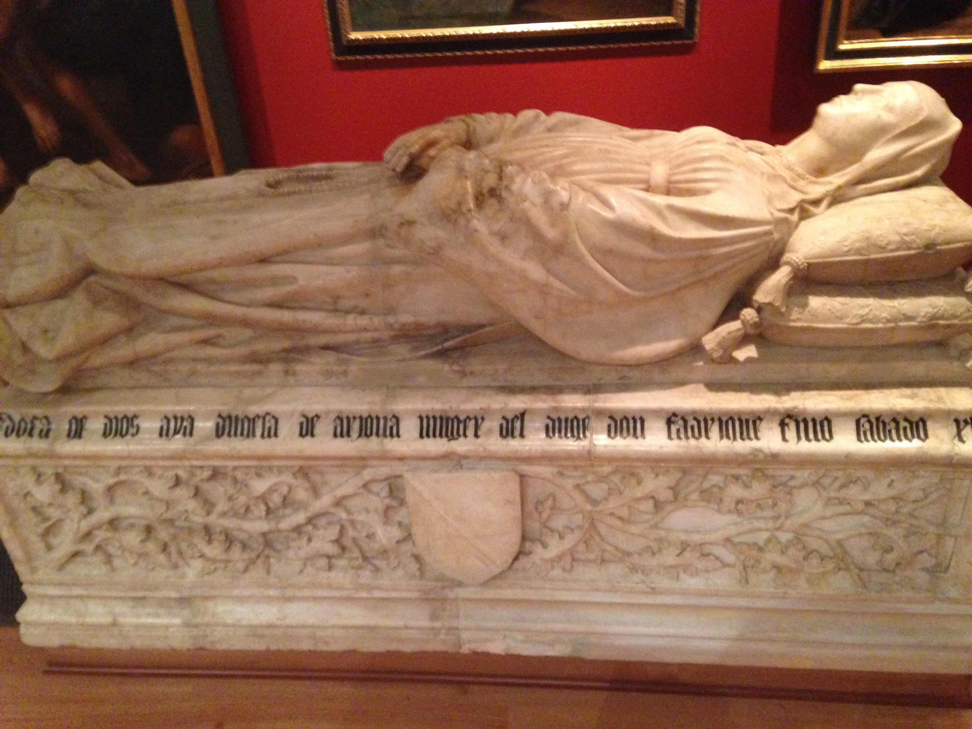 Sepulcro de la duquesa Aldonza de Mendoza († 1435), que fue hija de Diego Hurtado de Mendoza, almirante de Castilla, y esposa de Fadrique Enríquez de Castilla, duque de Arjona y conde de Trastámara. El sepulcro procede del monasterio de San Bartolomé de Lupiana.